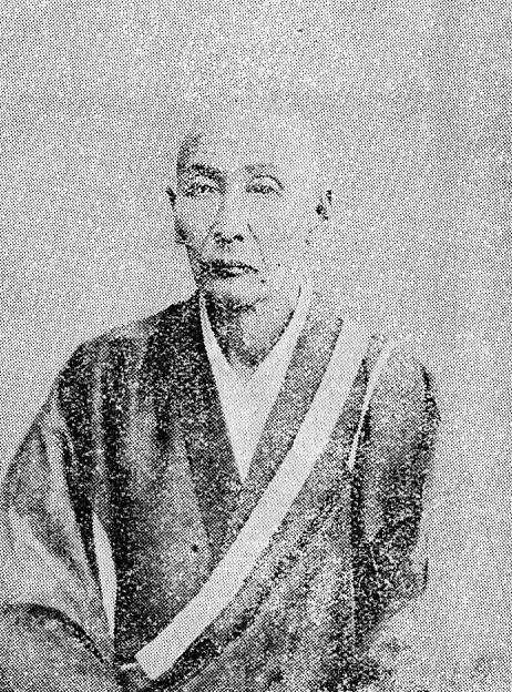 藤岡覚音翁。1922年発行の下益城郡誌より